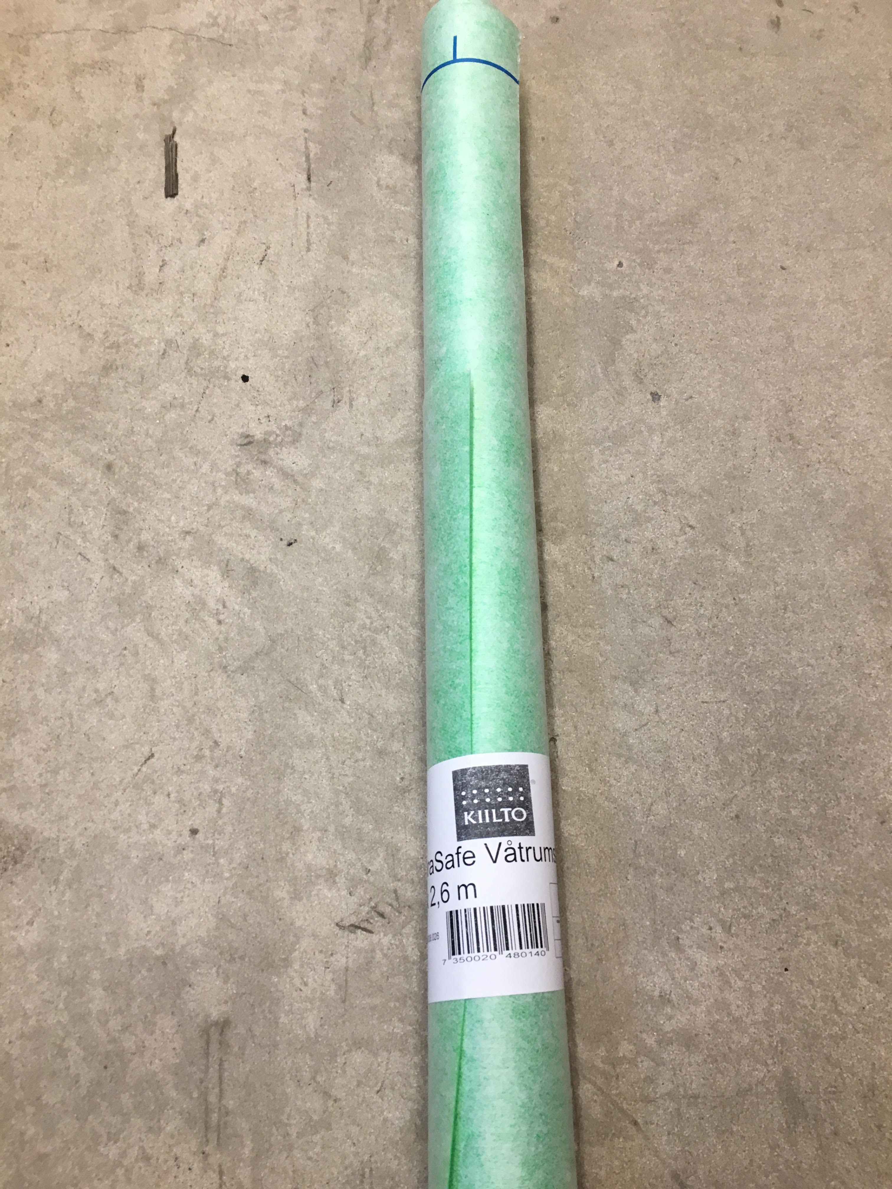 våtrumsfolie